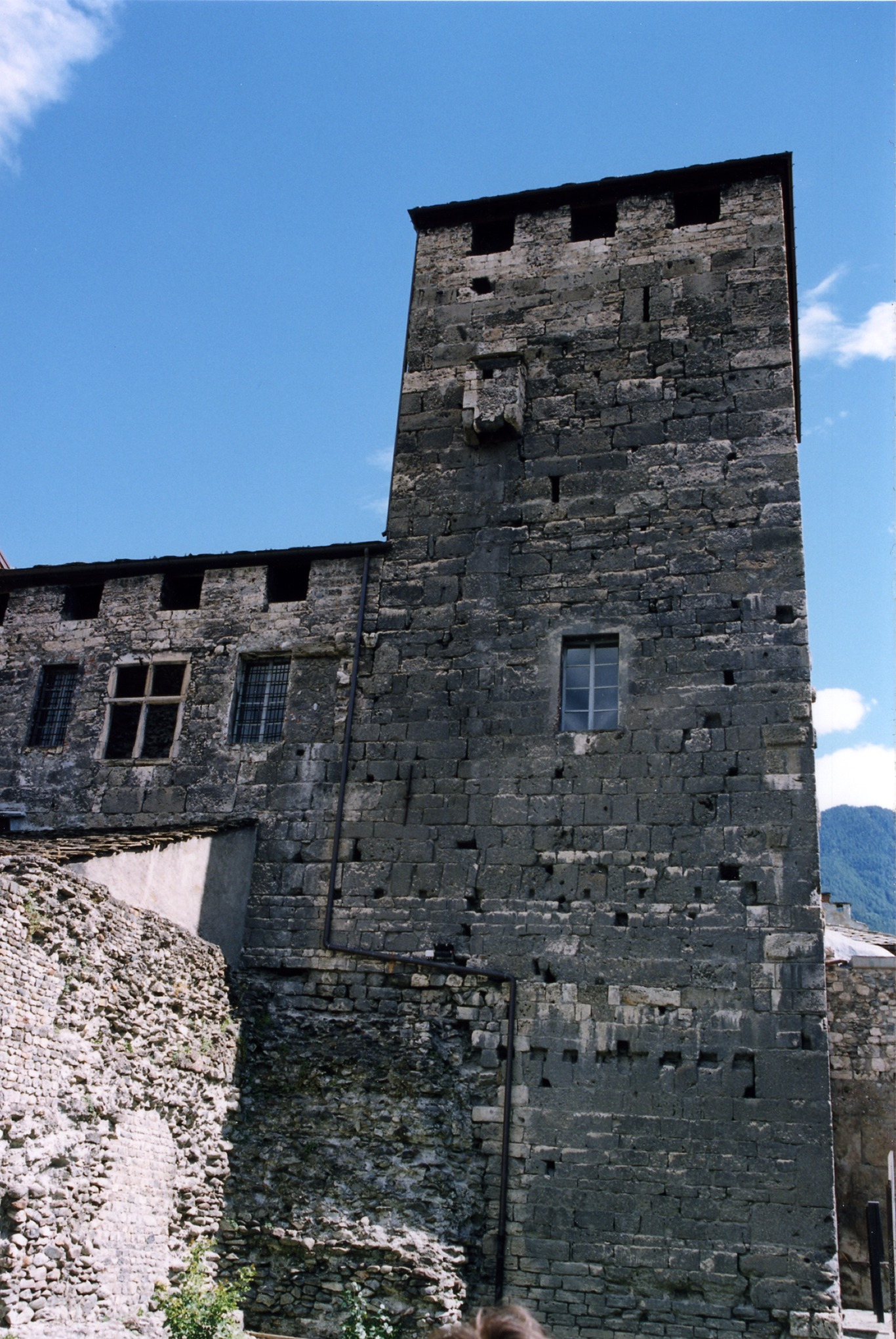 La Tour des Seigneurs de Quart, à Aoste, à proximité des ruines romaines.